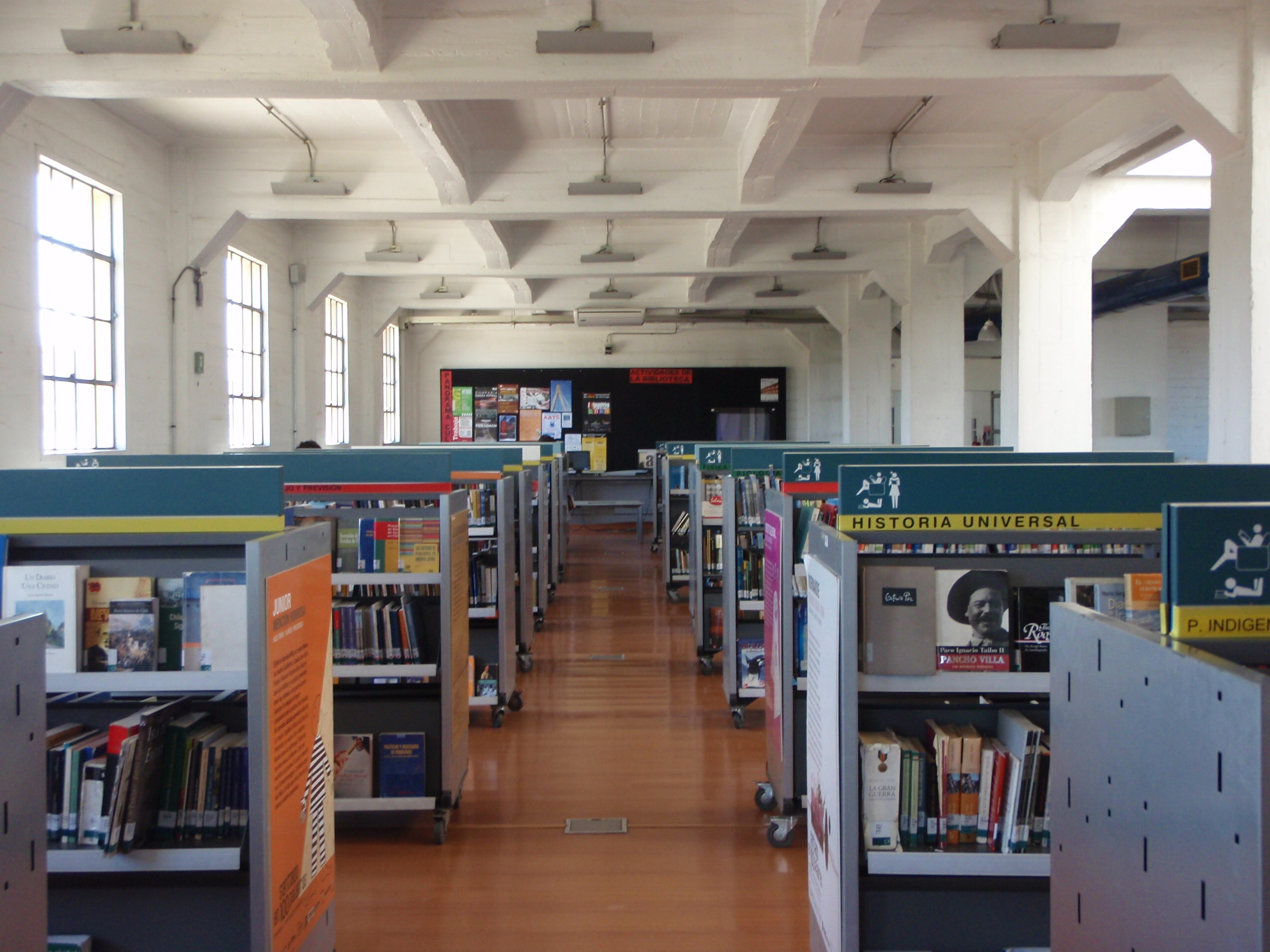 Edificio de la Ex Dirección General de Aprovisionamiento del Estado This is a photo of a national monument in Chile: 452